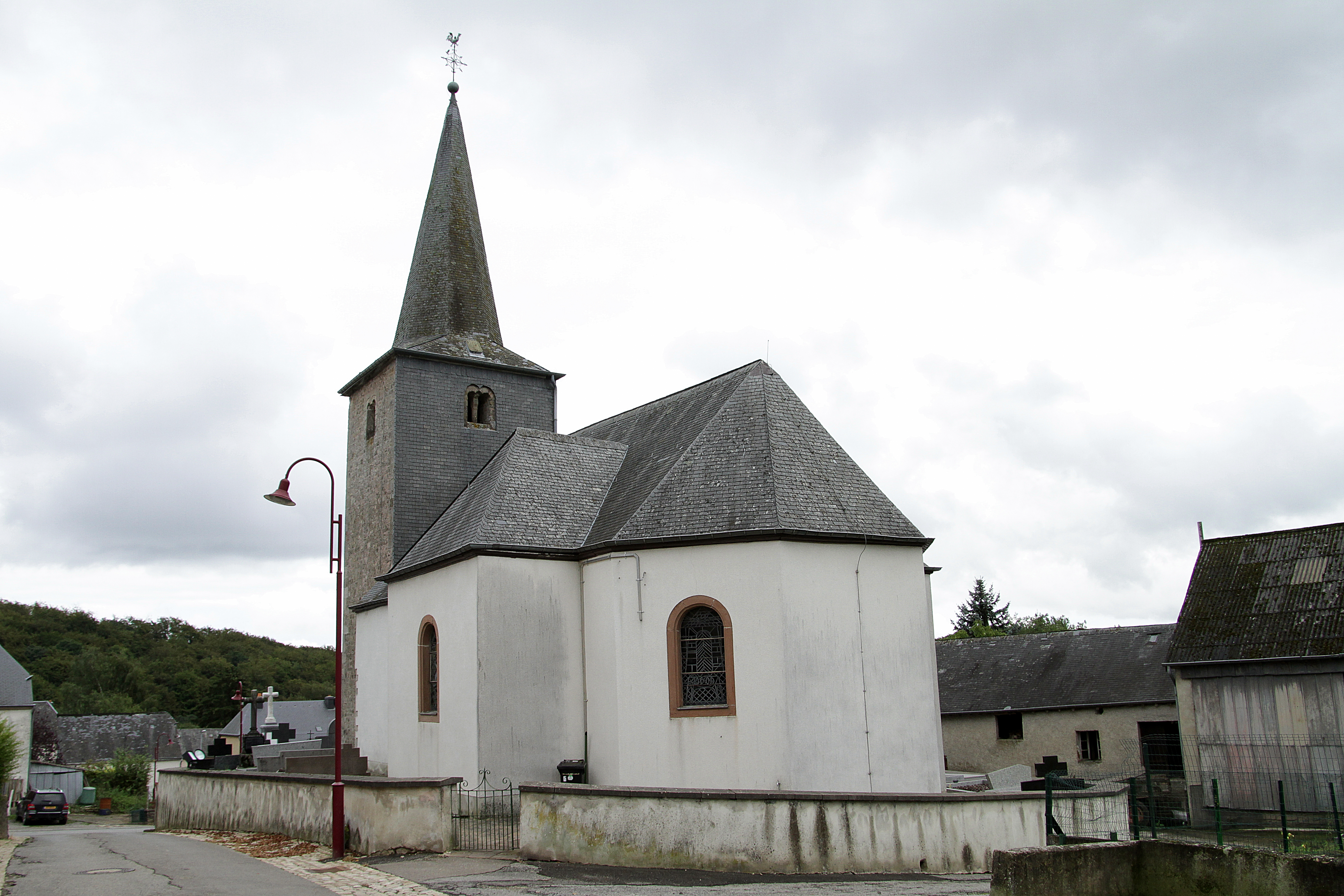 D'Kierch zu Lannen